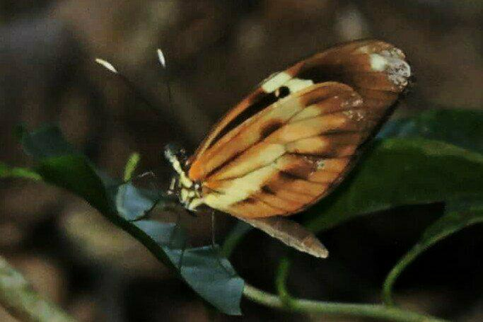 Dismorphia amphione __ Tremembé SP_ Brasil